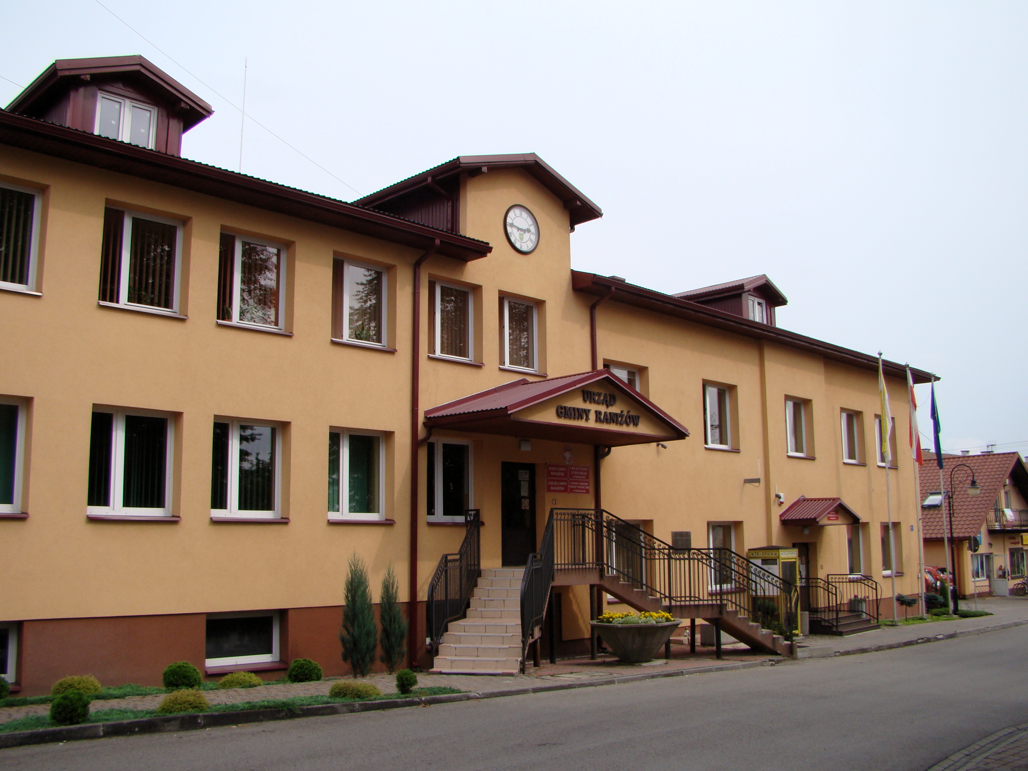 Raniżów - Urząd Gminy